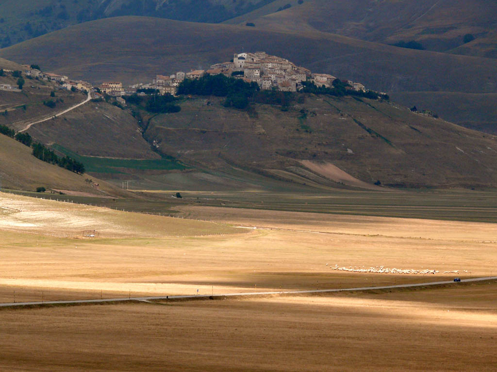 Piana di Castellucio